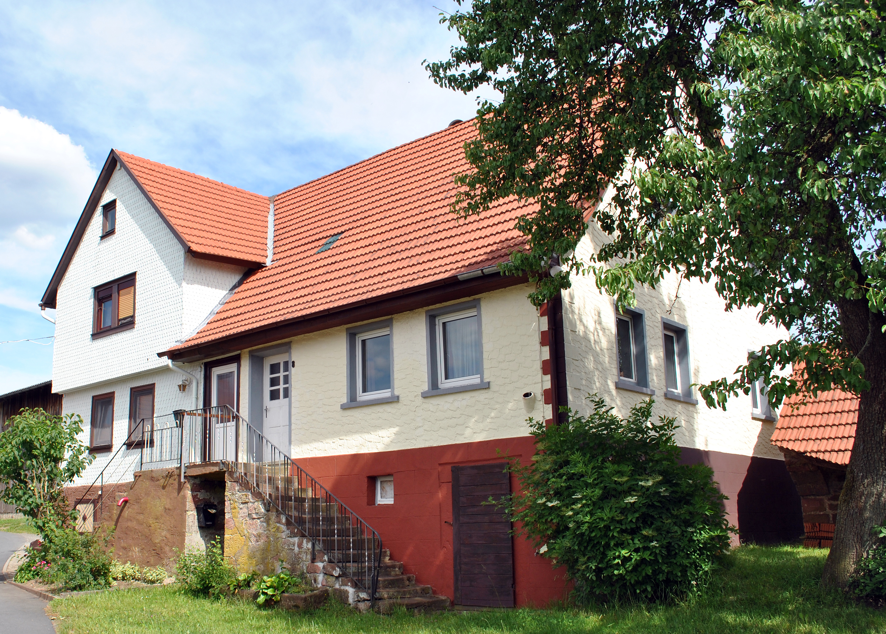 So genanntes "Einhaus" in Hesselbach auf der Wiesenstr. 9. Landwirtschaftliches Gebäude, bei dem Wohnbereich, Stallung, Scheune und Vorratskeller unter einem Dach untergebracht waren. Frühes 19. Jahrhundert.